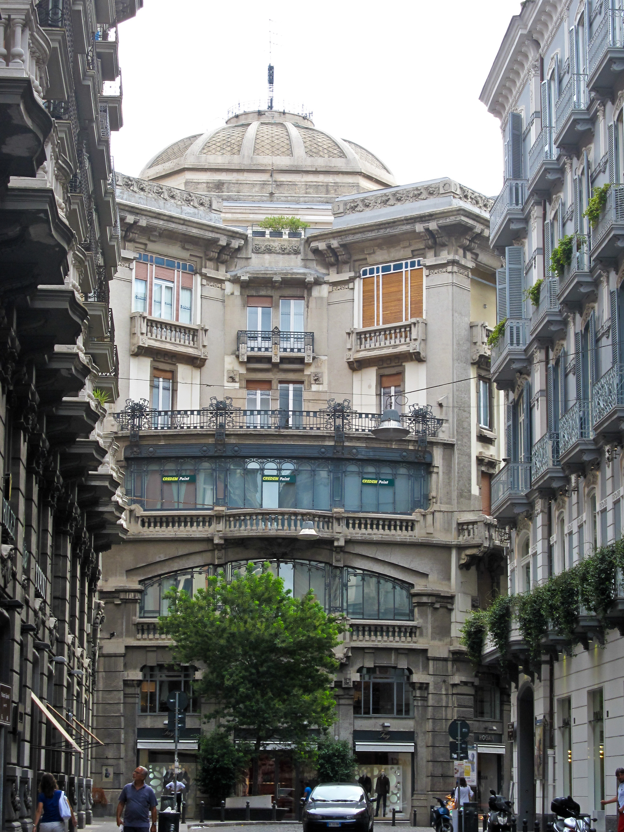 Giulio Ulisse Arata - Palazzo Mannajuolo (Via Filangieri 36) Realizzato tra il 1909 e il 1911. Al di là della bellezza architettonica indiscutibile, il piatto forte di questo edificio è rappresentato dalla scala principale di forma ellissoidale.